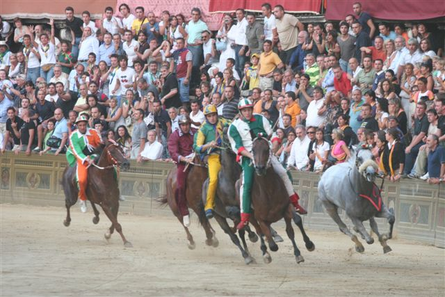 Un momento della corsa del Palio dell'Assunta 2008 vinto dal Bruco.